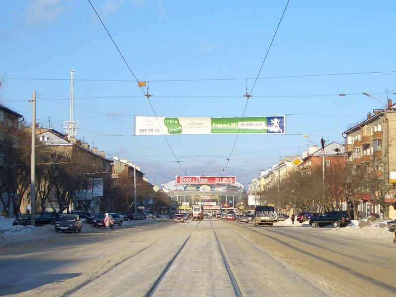 Krupskaya Street in Perm